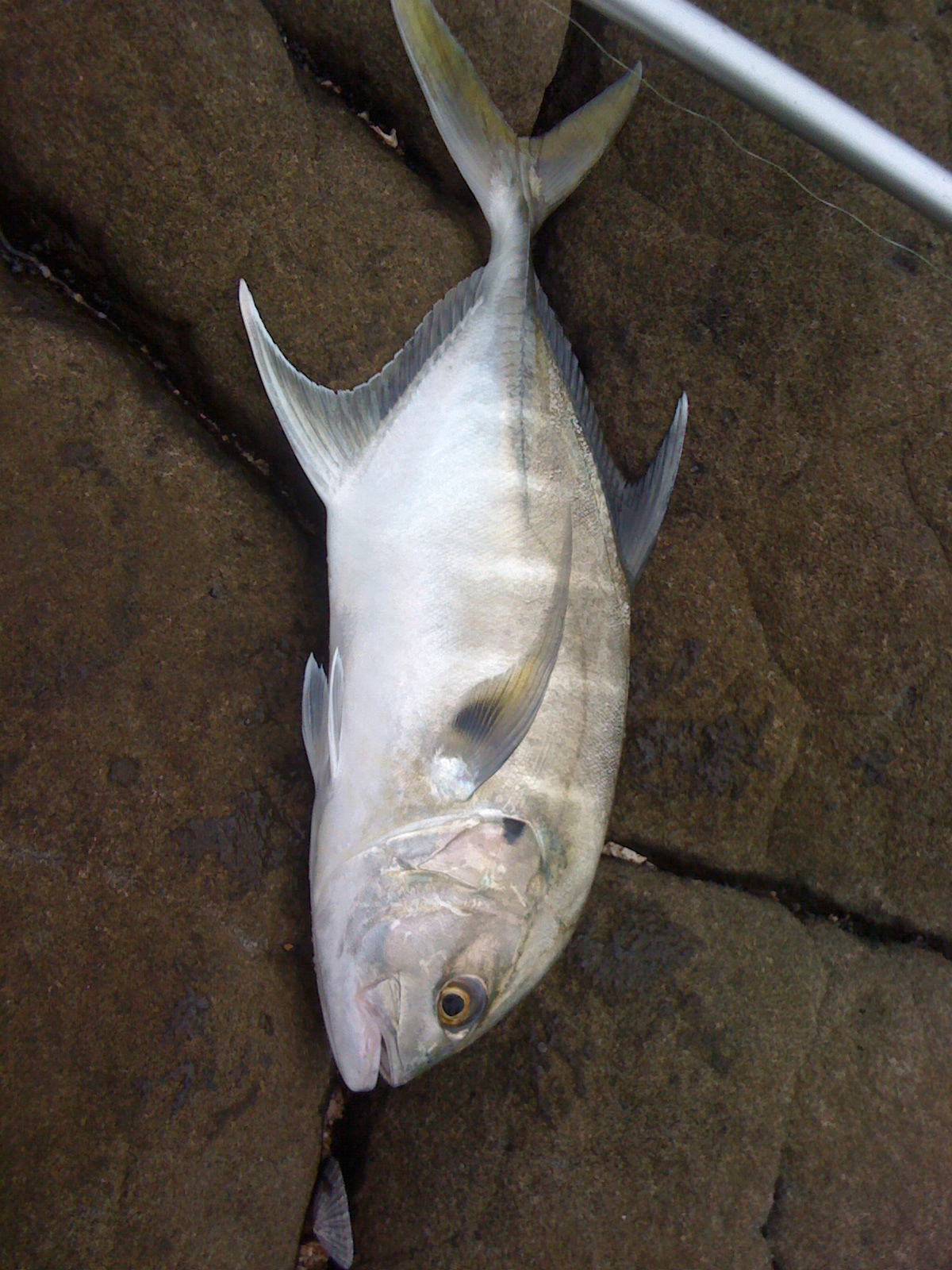 Caranx Senegallus pêché sur la côte de Dakar